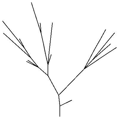 simulation d'un arbre de galton-Watson avec une loi de reproduction : Poisson de paramètre 1. arbre contenant 11 générations et 47 noeuds